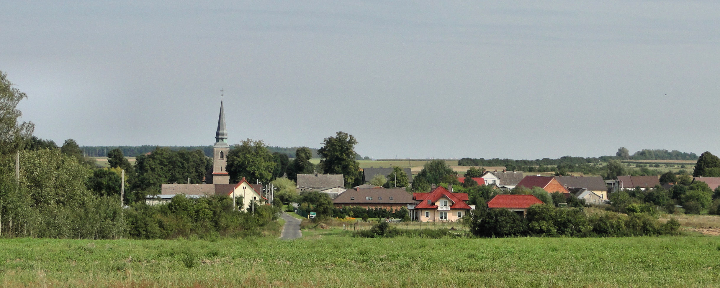 Panorama wsi Bielkowo w powiecie stargardzkim